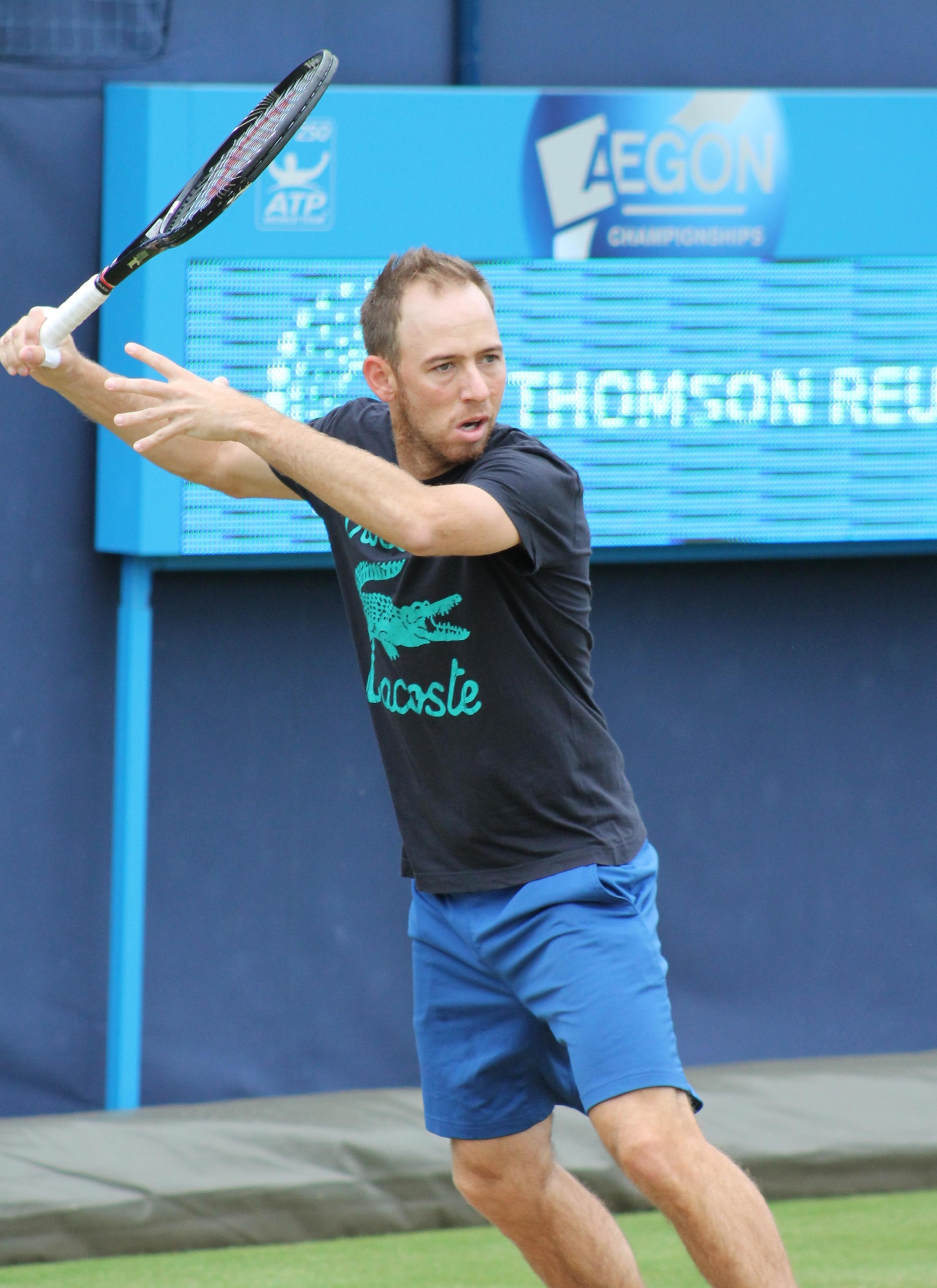 Sela QC13-010